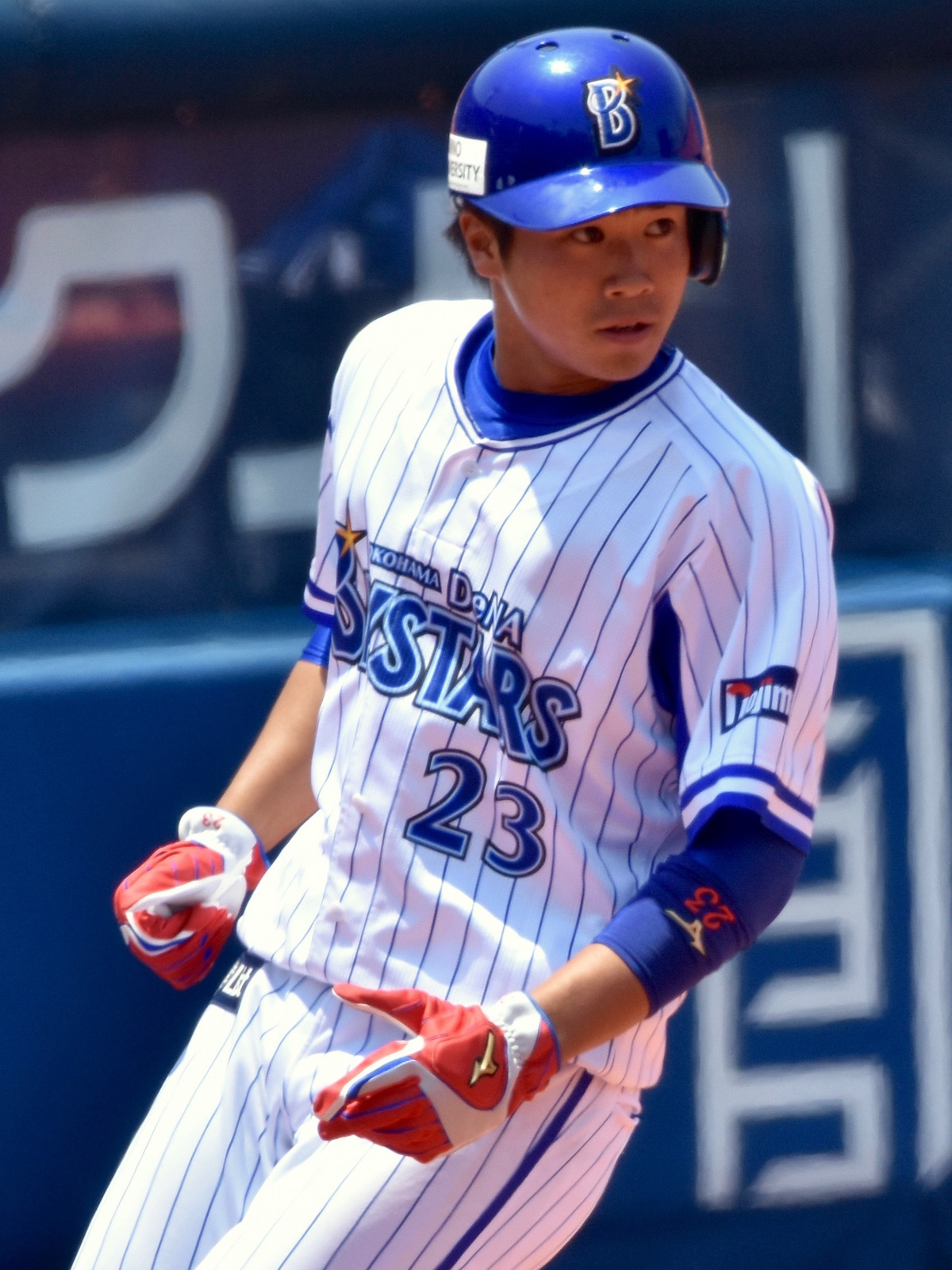 2017年6月16日、横浜スタジアムにて